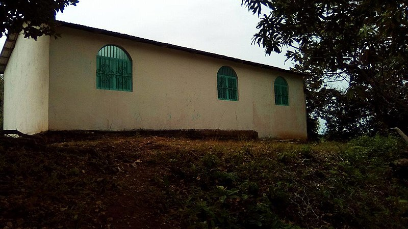 Adolfo Lopez Mateos (zacatal) Jesus carranza